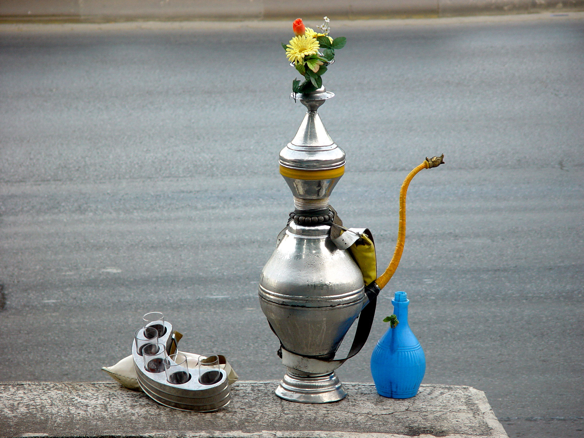 Istanbul Turkey